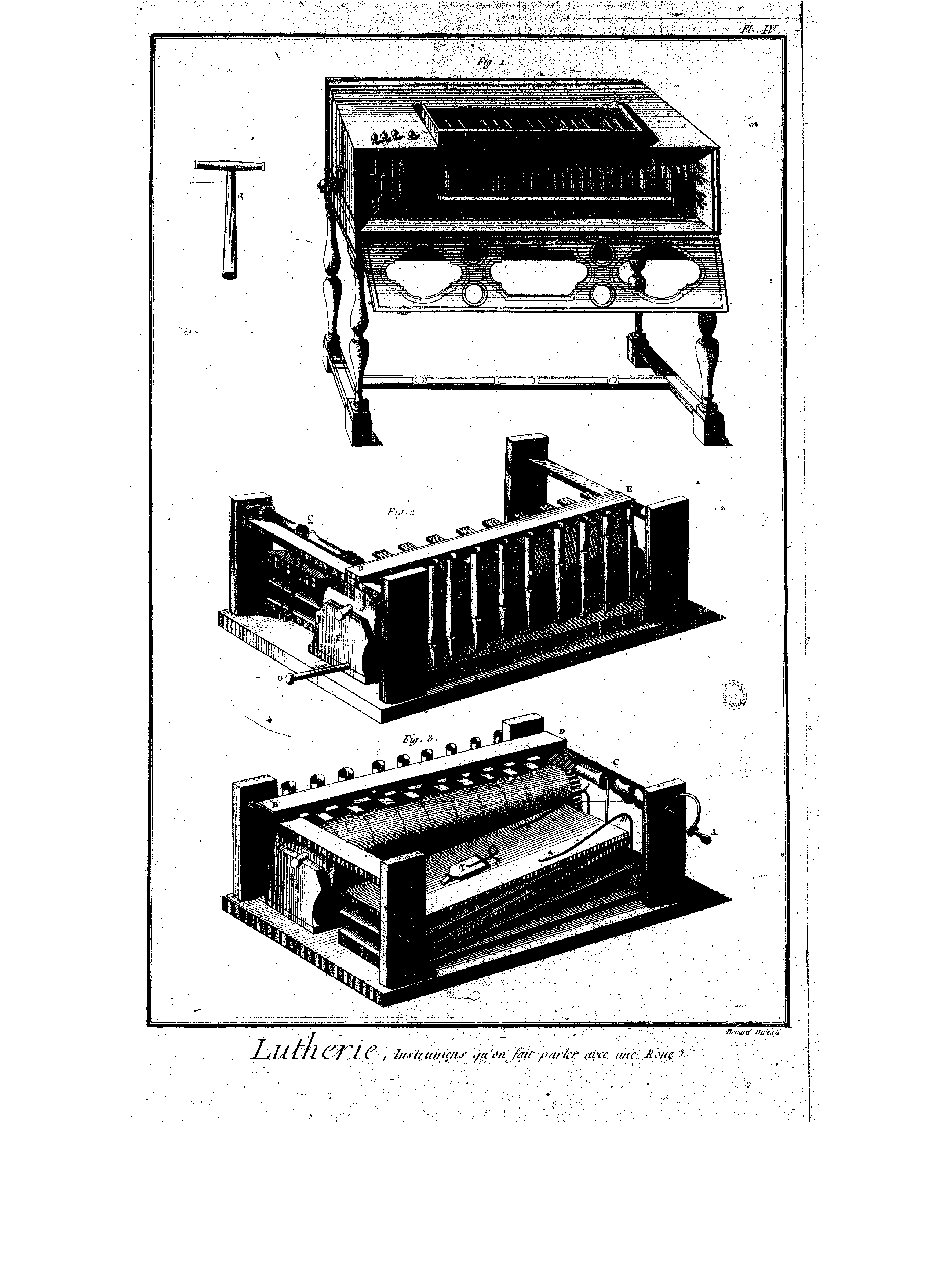 Planches de l'Encyclopédie de Diderot et d'Alembert, volume 4